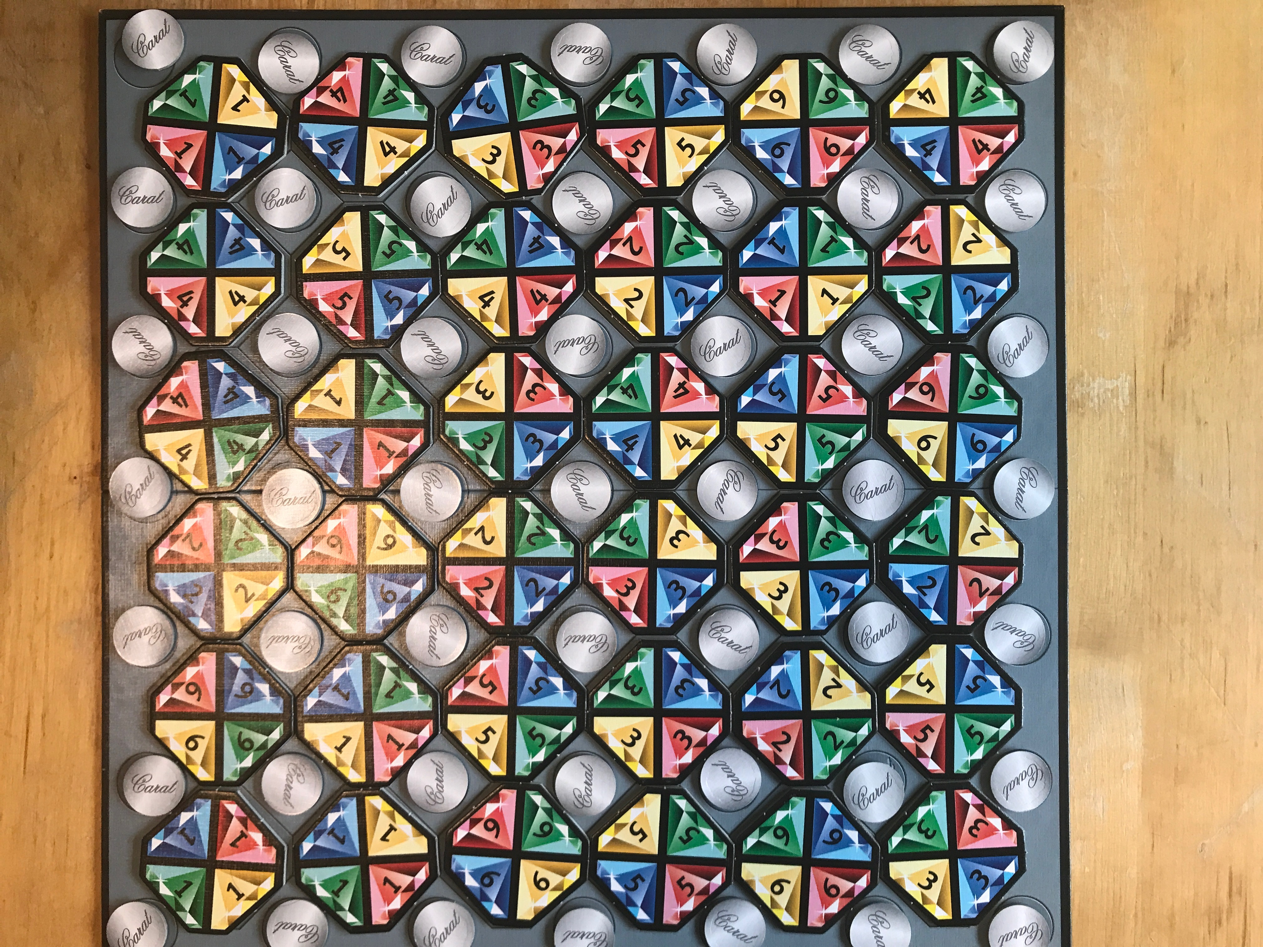 Spielmaterial des Brettspiels Carat